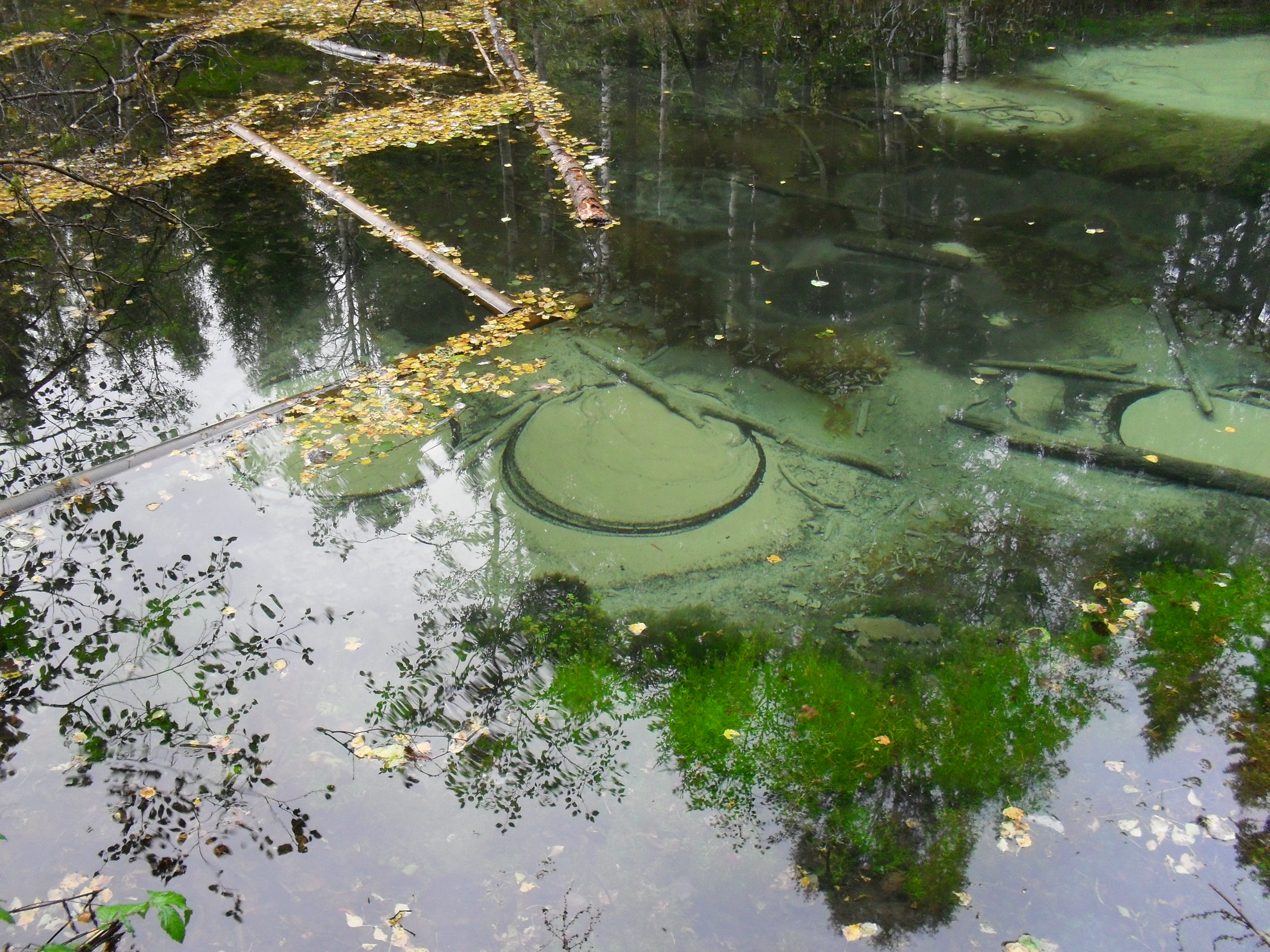 Ohvriallikad 'Saula Siniallikad', Valgeallikas